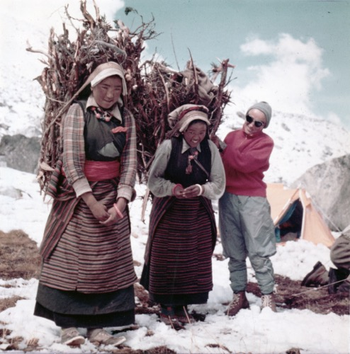 Claude Kogan avec 2 porteuses au Nangpala lors de l'expédition féminine de 1959 au Népal.